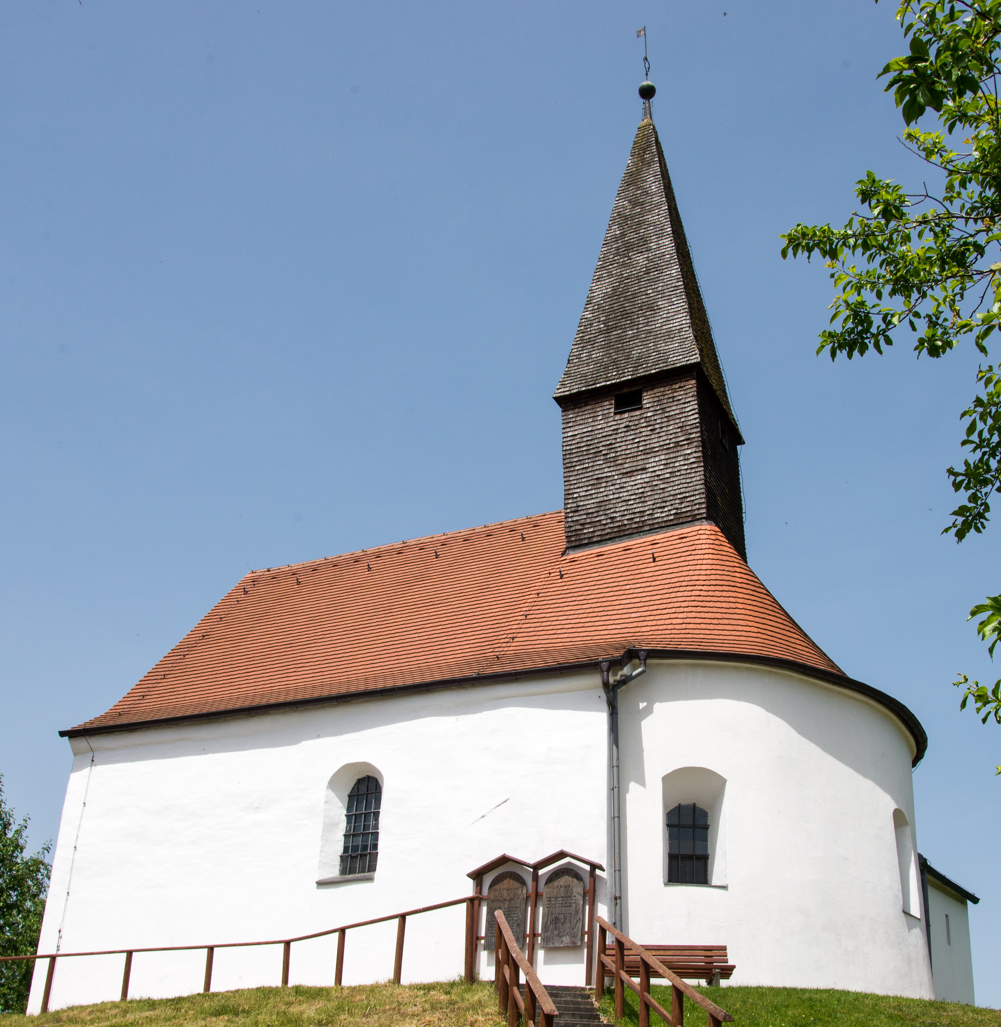 Katholische Kirche St. Petrus: Saalkirche, über dem Chor verschindelter Dachreiter mit Spitzhelm, spätromanisch, 12/13. Jahrhundert; mit Ausstattung. This is a photograph of an architectural monument.